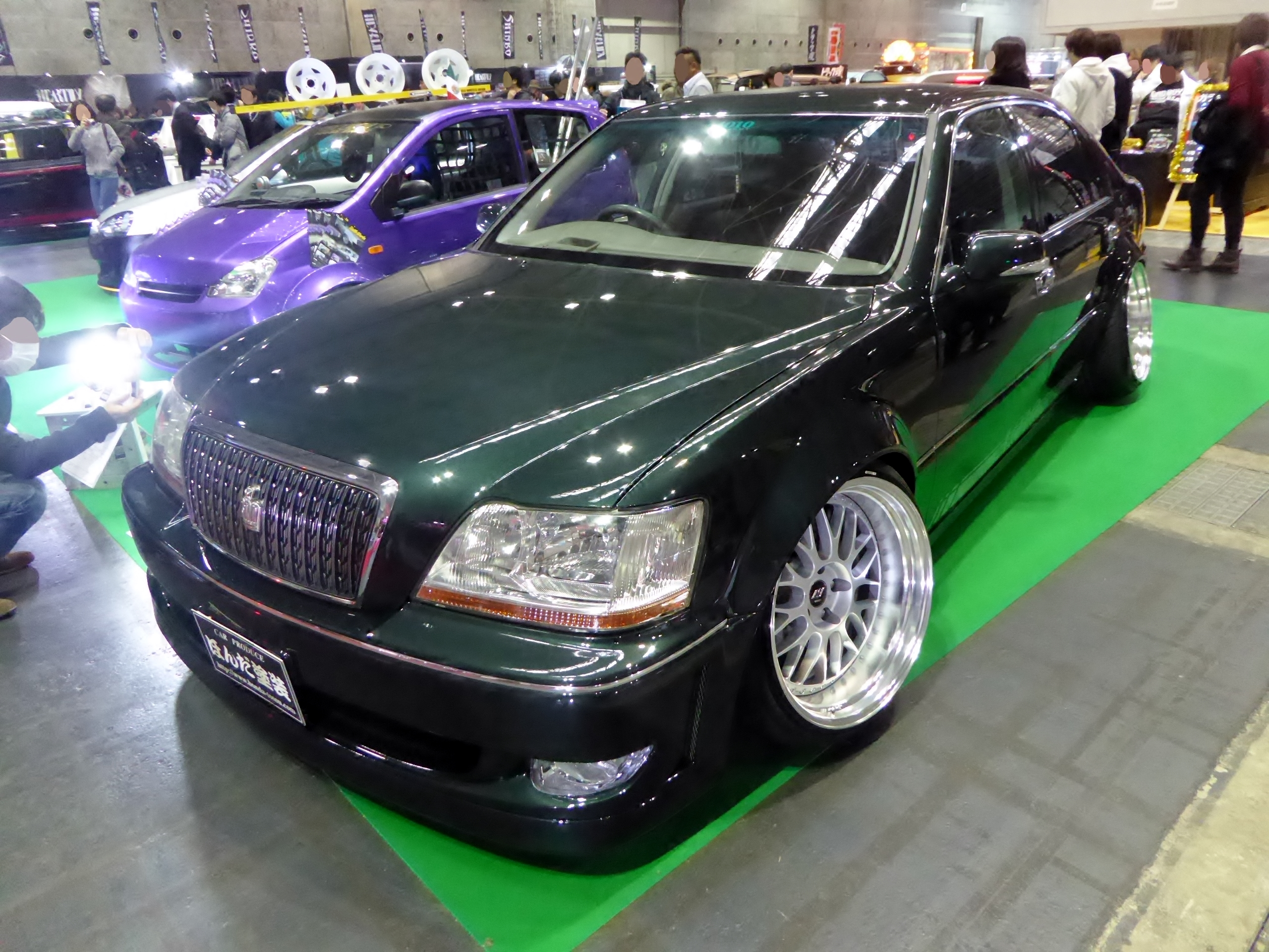 大阪オートメッセ2016においてほんだ塗装の手がけたS170系トヨタ・クラウンマジェスタを撮影。